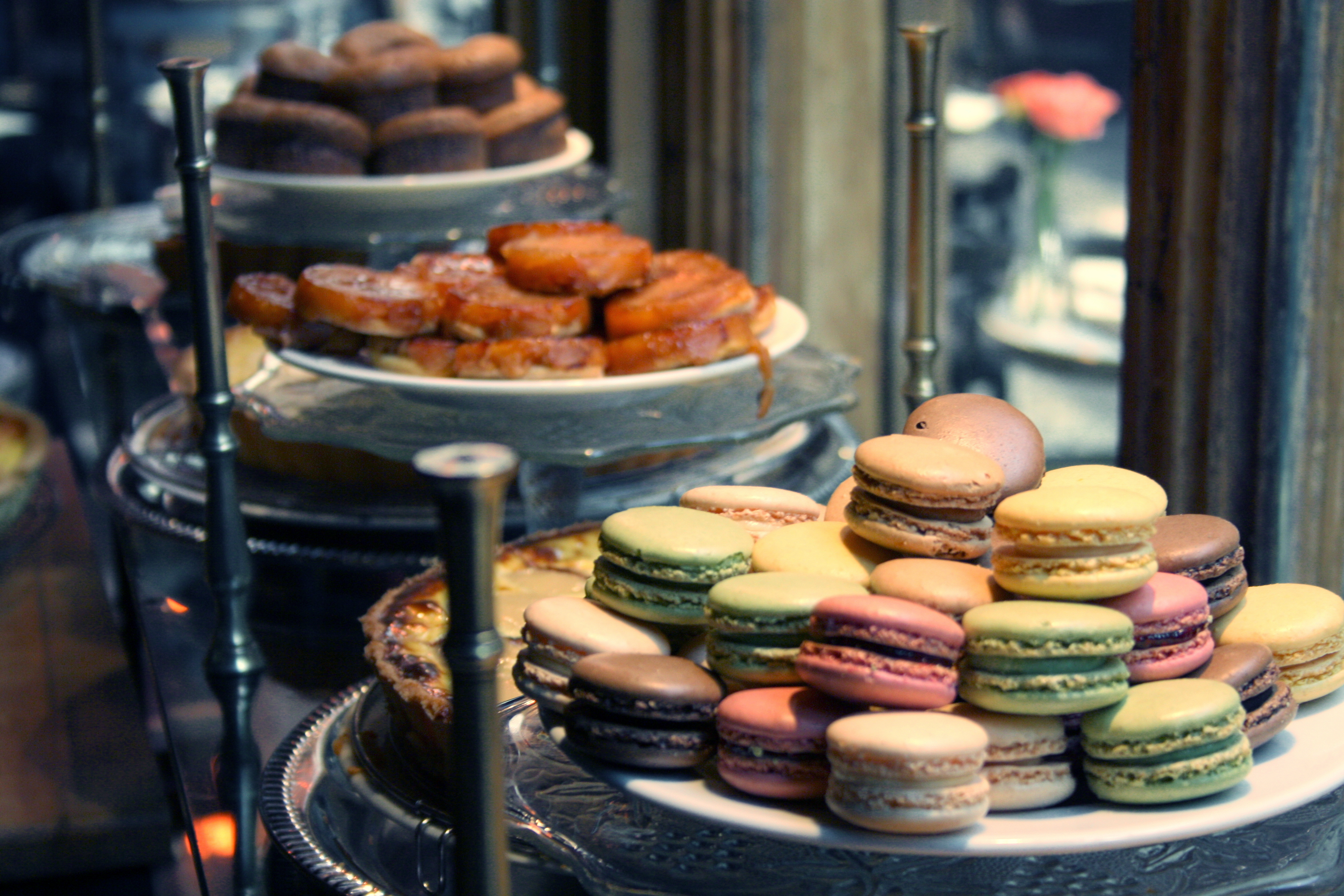 L'Arbre à Cannelle restaurant, 57 Passage des Panoramas, 75002 Paris, France.